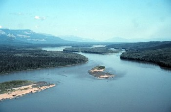 Der Liard River